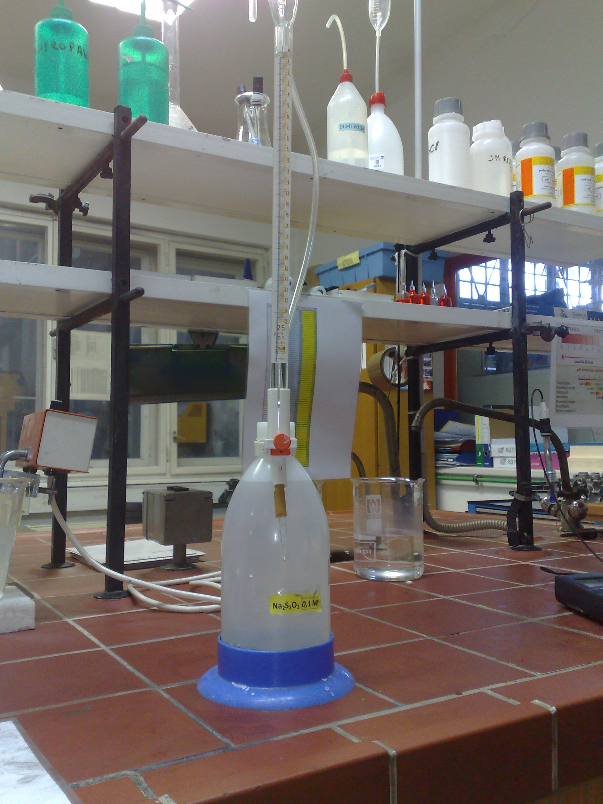 Priprava raztopine.